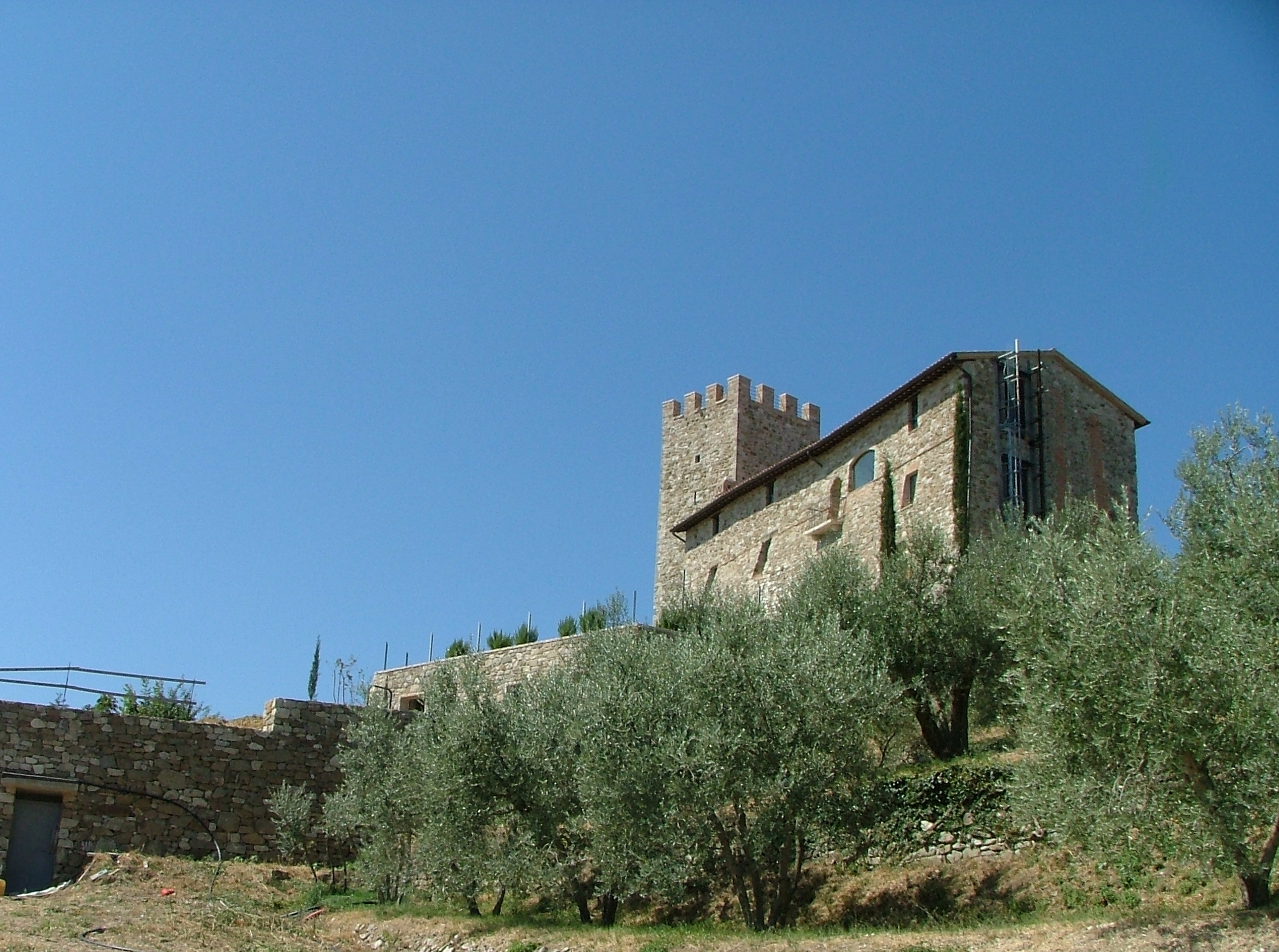 Castello di Civitella dei Conti - San Venanzo (TR) antico feudo dei Conti di Marsciano